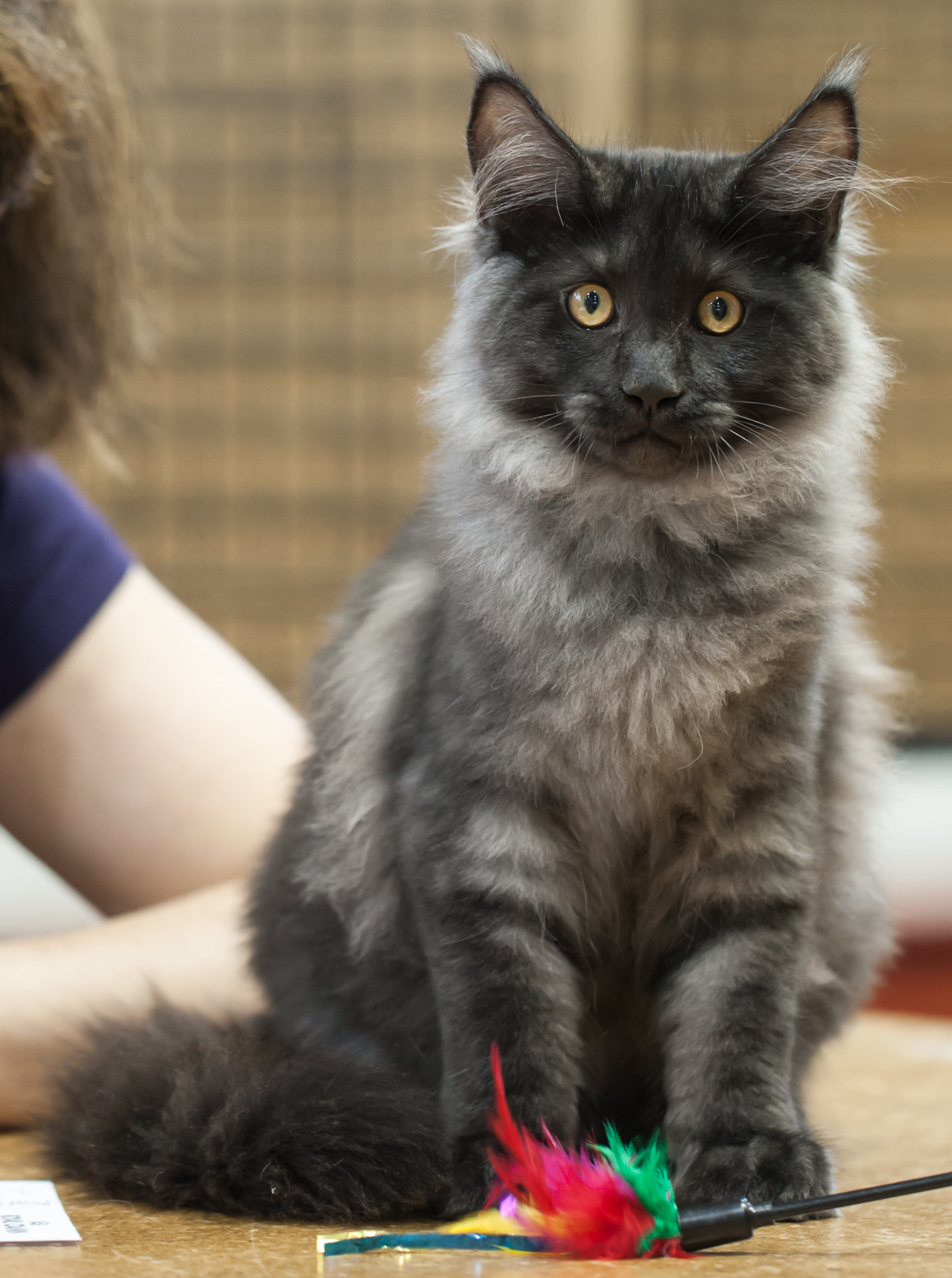 Chamberlain Quinn The Mighty, chaton mâle maine coon présenté à l'exposition féline FIFé de Hyvinkää en Finlande. Couleur : Noir smoke. Code FIFé : Chamberlain Quinn The Mighty (Varjo) [MCO ns] male kitten EX1 BIV NOM